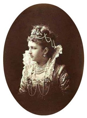 Княгиня Елена Михайловна Барятинская, ур. Орлова-Денисова (1851—1914)